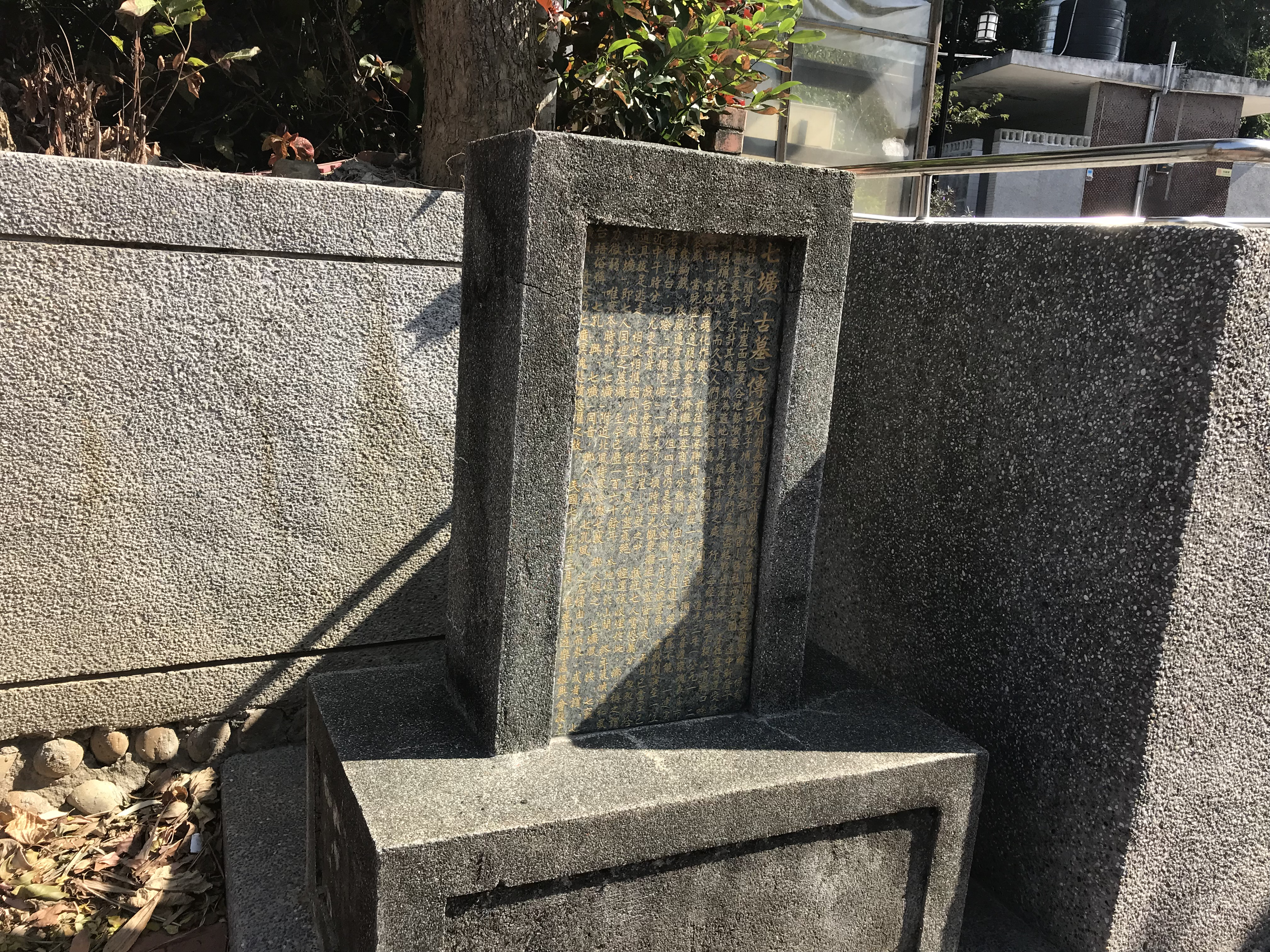 七壙古墓傳說說明碑